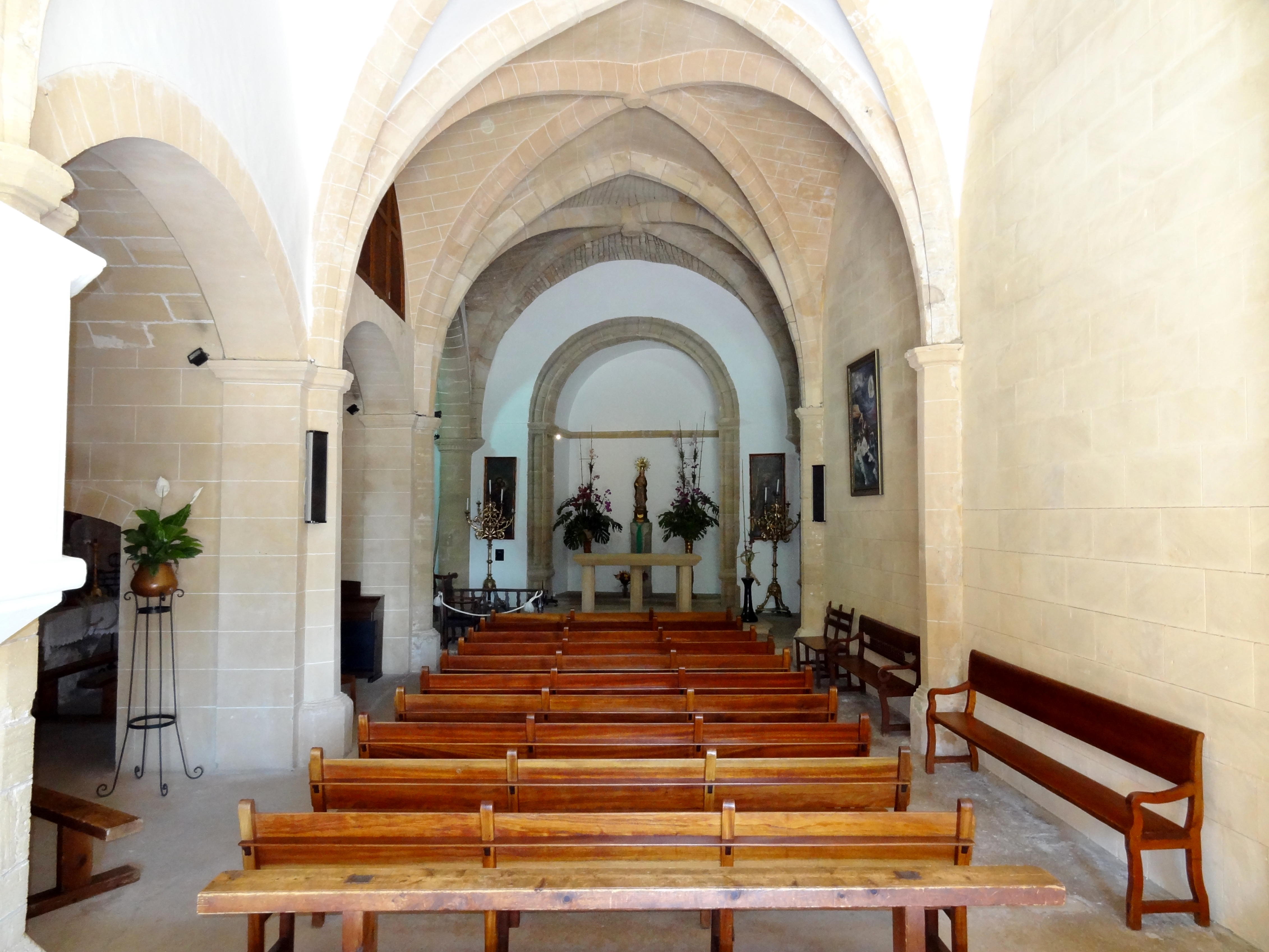 Innenraum der Kirche Nuestra Senyora de la Esperanza im Castell de Capdepera, Gemeinde Capdepera, Mallorca, Spanien